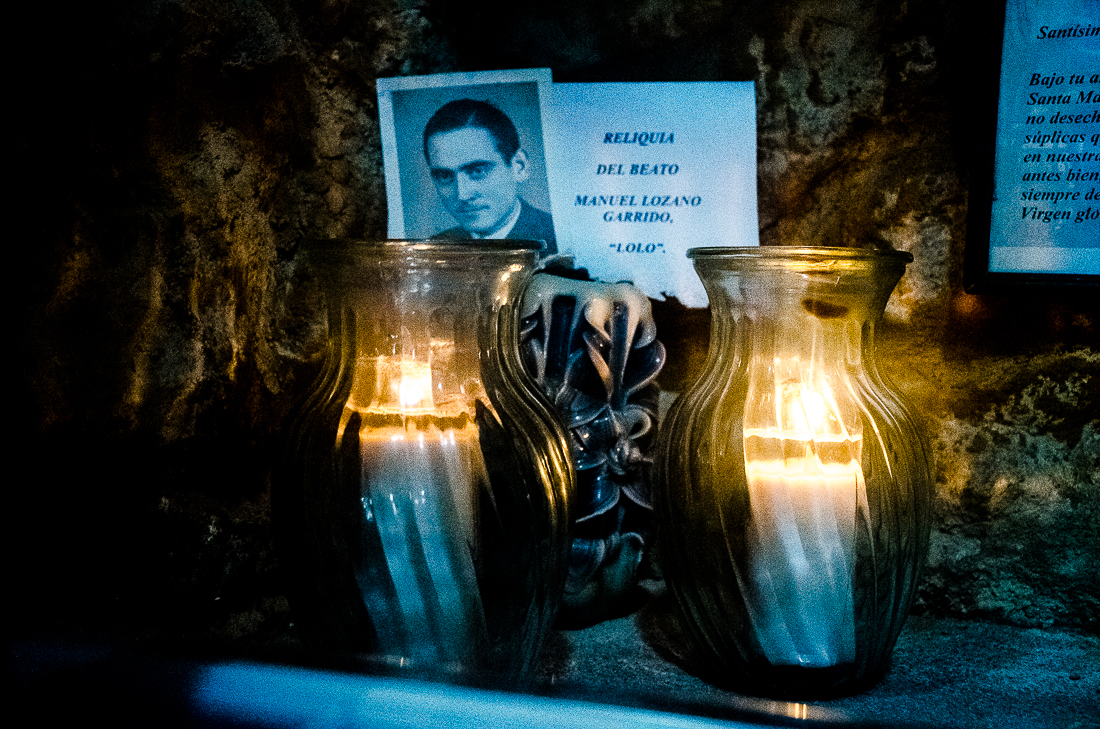 Manuel Lozano Garrido. Imagen en el Santuario de Tíscar (Jaén).